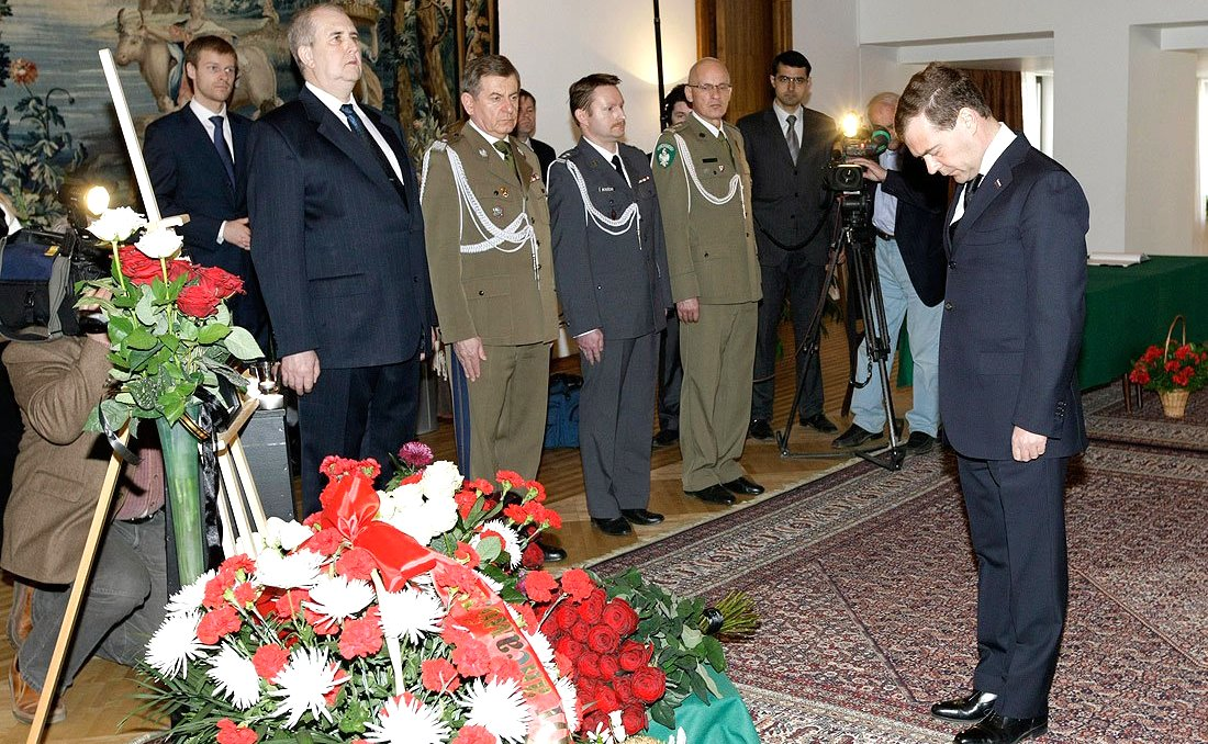 В посольстве Республики Польша.